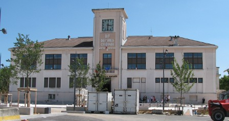 Mairie de Decines Charpieu